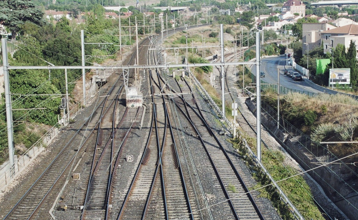 Gare de l'Estaque, sortie sud : au centre les voies vers Marseille-Saint-Charles, à droite les voies vers la Joliette (la voie impaire passe sous le faisceau Saint-Charles)